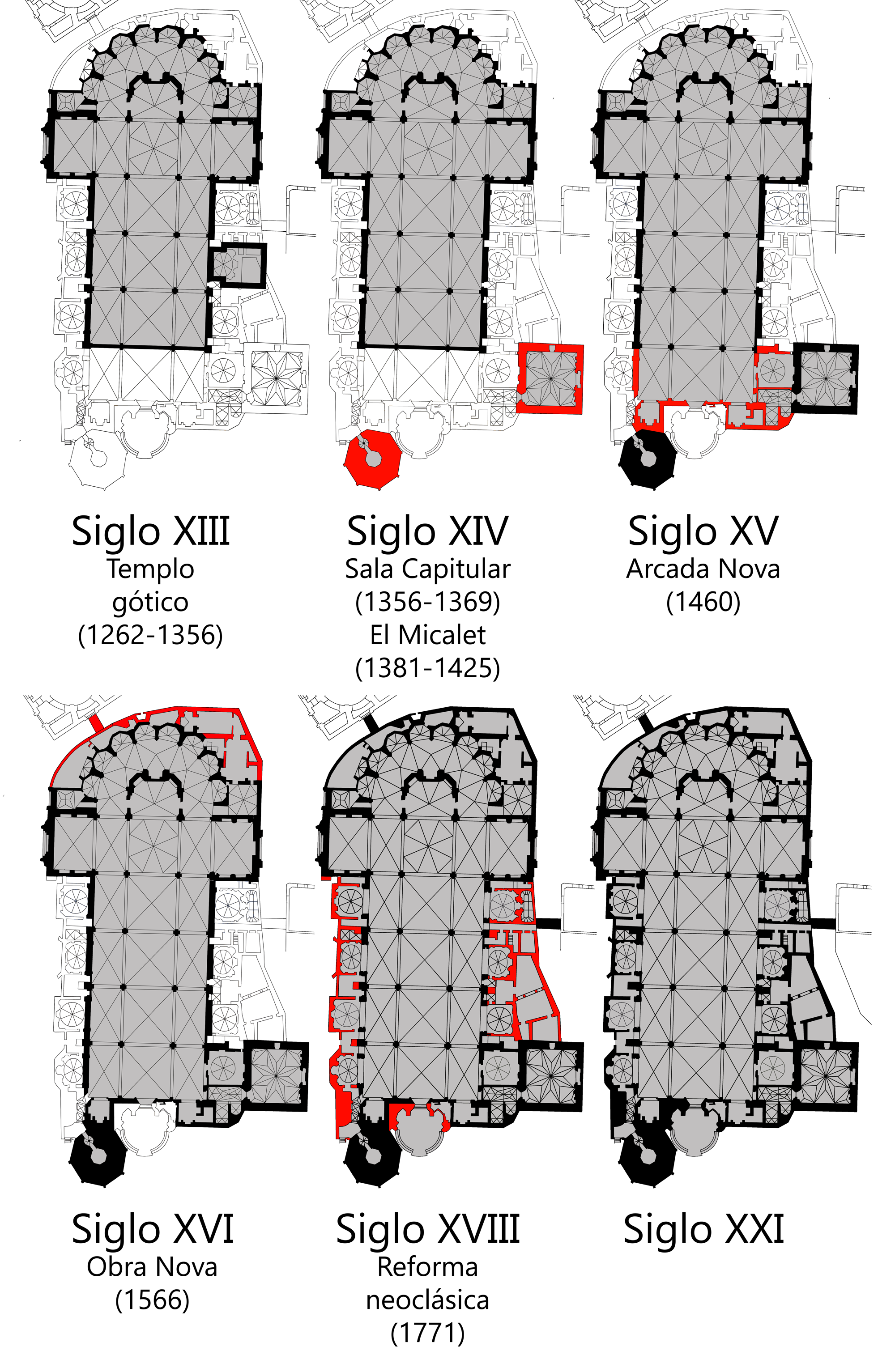 Evolución de la planta de la Catedral de Valencia desde el siglo XIII hasta la actualidad indicando las principales ampliaciones. Valencia, Comunidad valenciana, España.